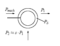 Wirkleistungsfluss DGAM